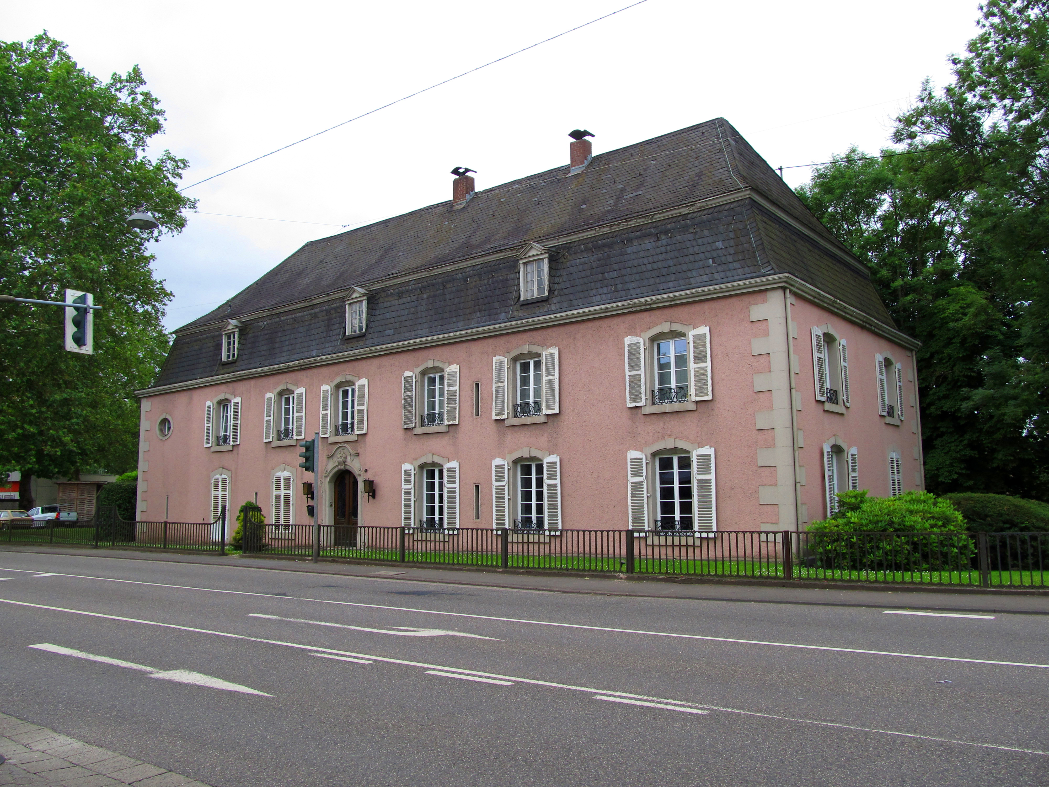 Forsthaus der Abtei Wadgassen in der Saarbrücker Straße in Bous, Landkreis Saarlouis, Saarland.